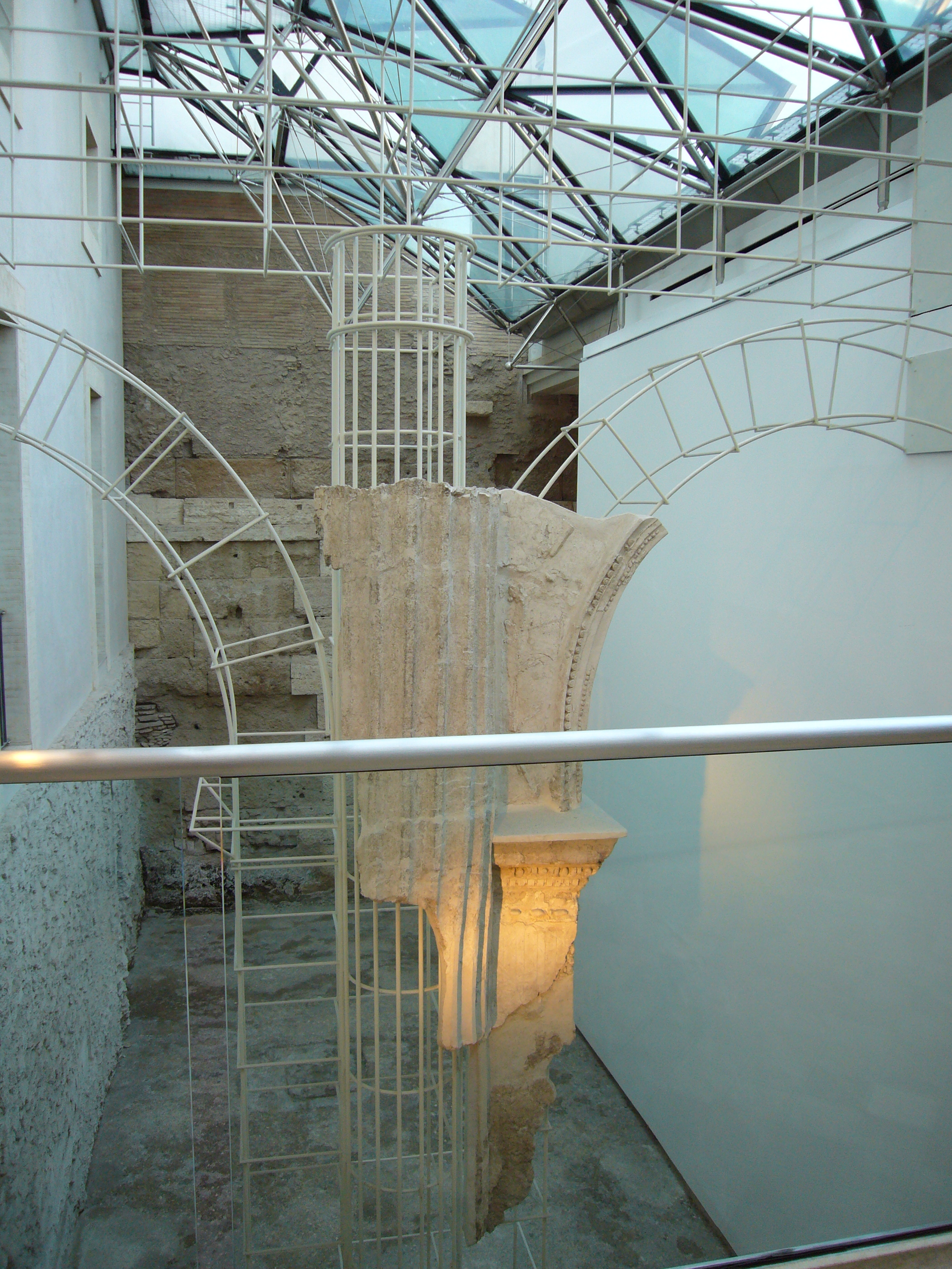 Roma, Crypta Balbi: ricostruzione esemplificativa degli edifici romani